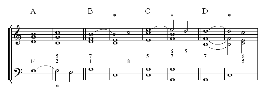 Description : Retard (harmonie) Source : Personnelle Licence : GFDL